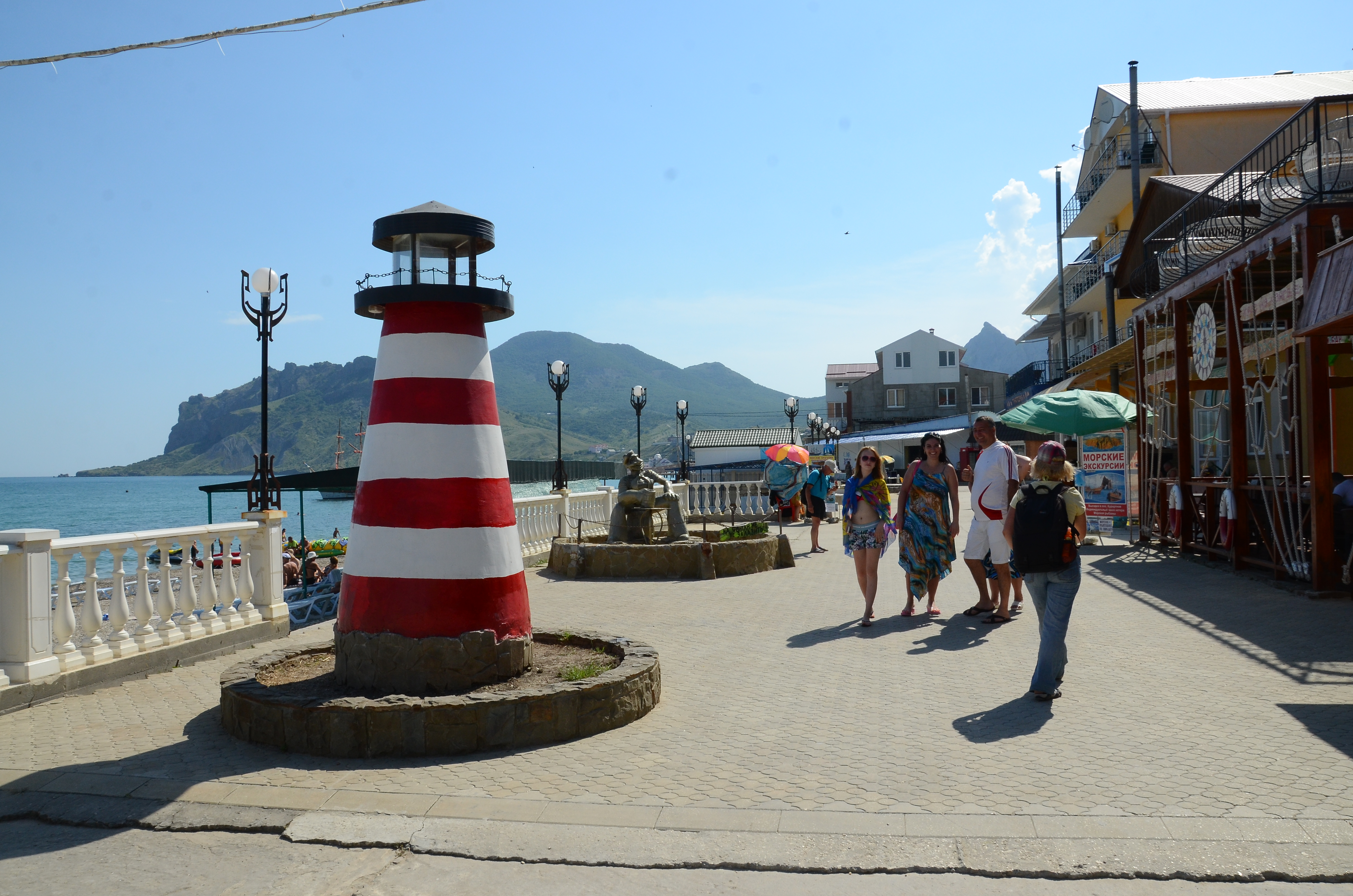 Коктебель